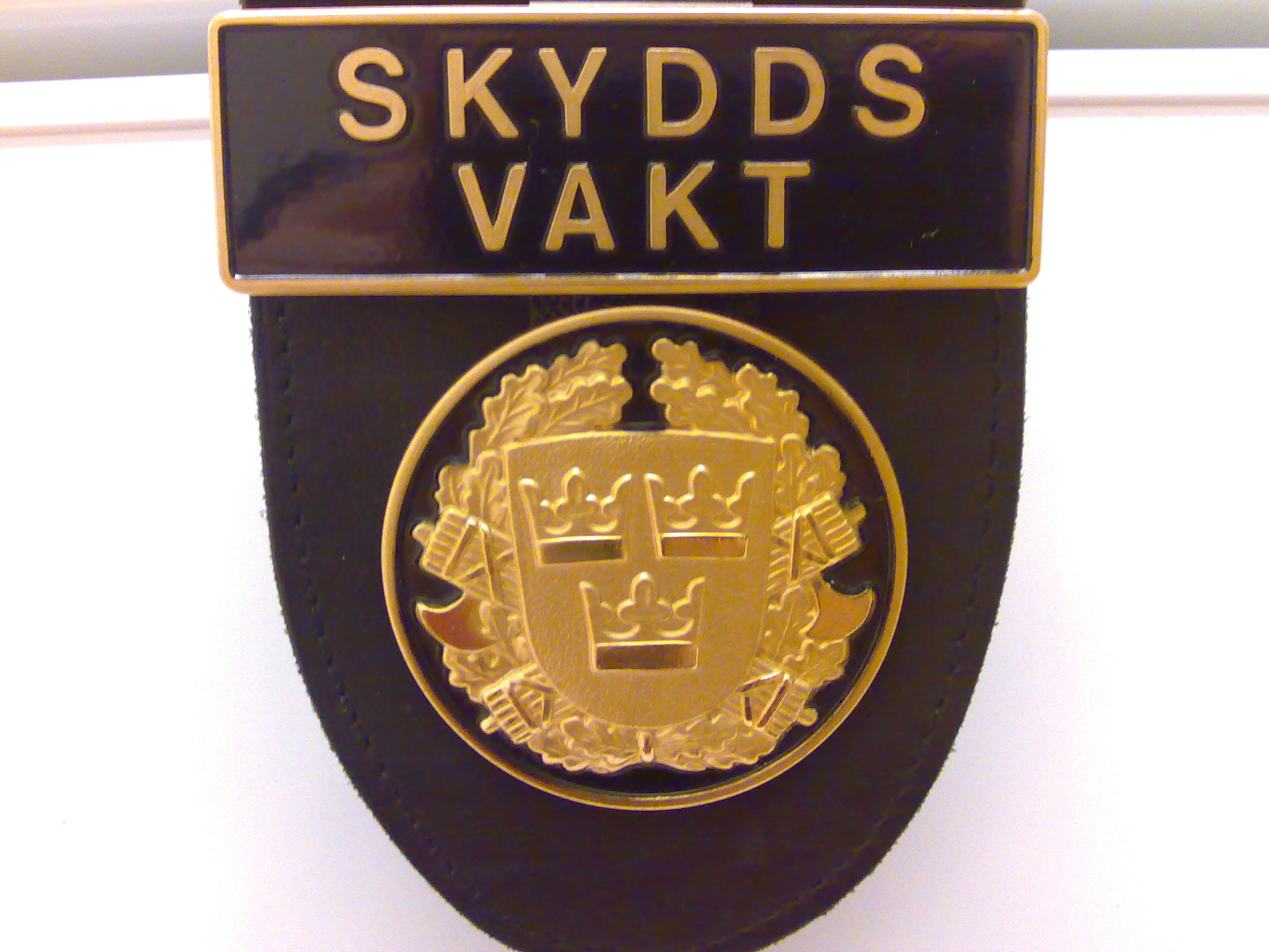 Skyddsvakt